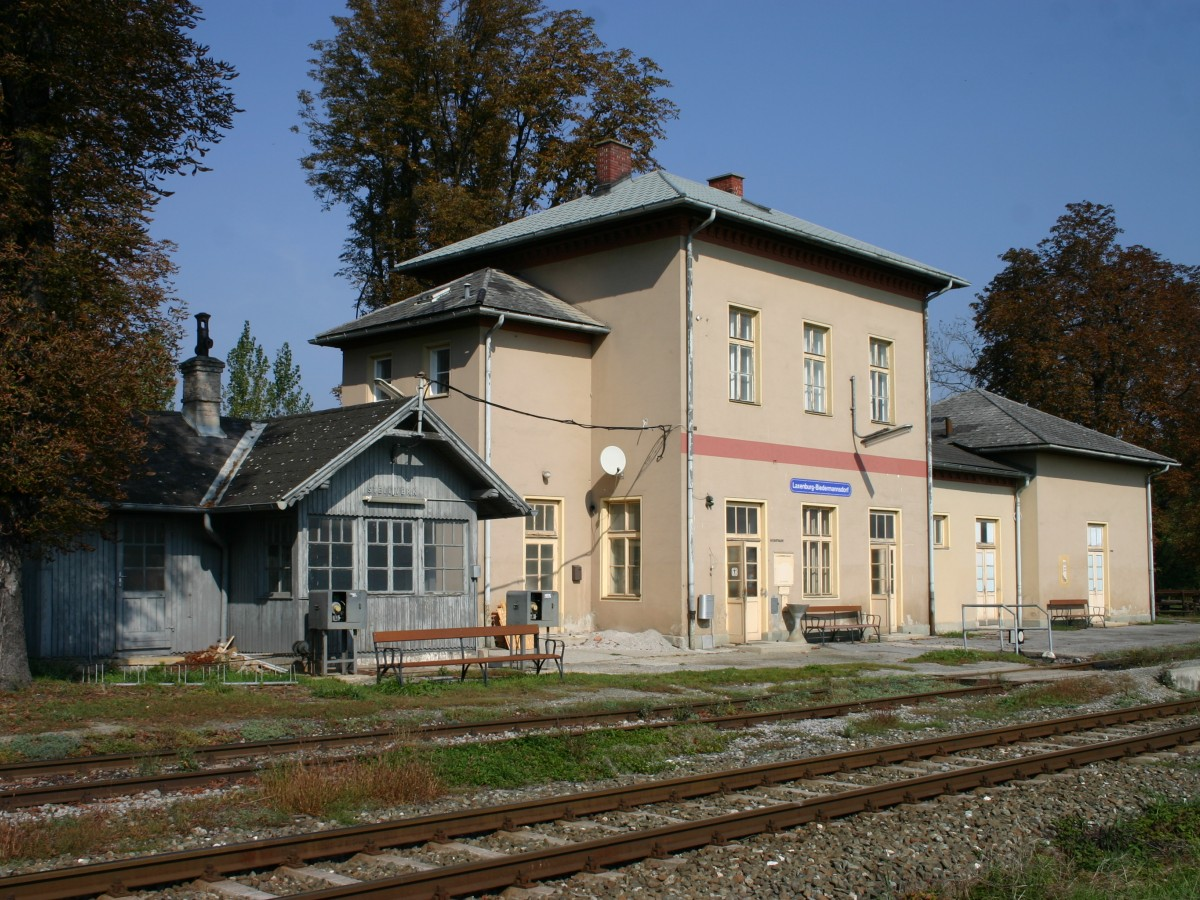 Aufnahmsgebäude im Bahnhof Laxenburg-Biedermannsdorf (Bild 1)